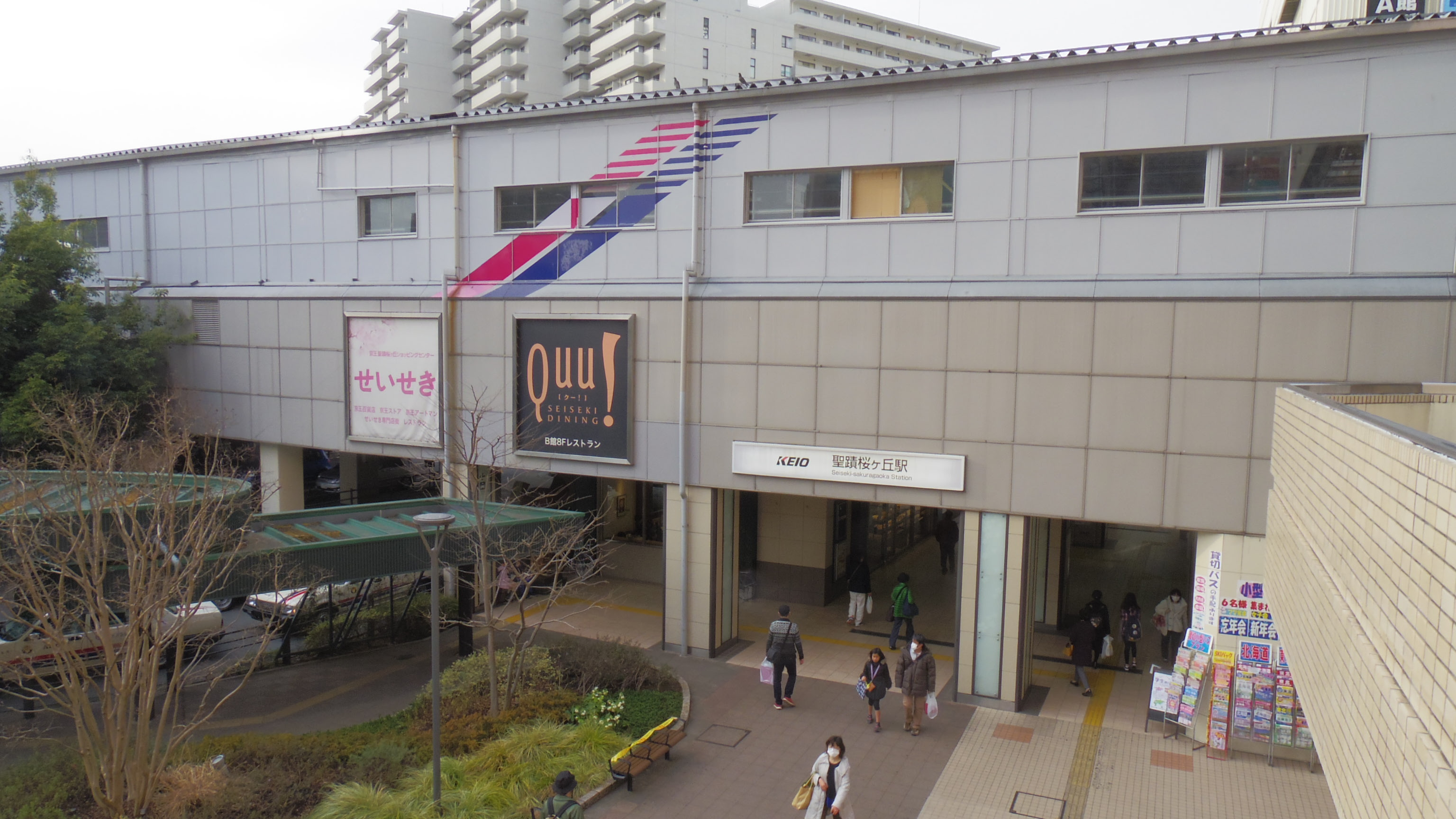 京王電鉄京王線・聖蹟桜ヶ丘駅（「せいせき」2階から撮影）